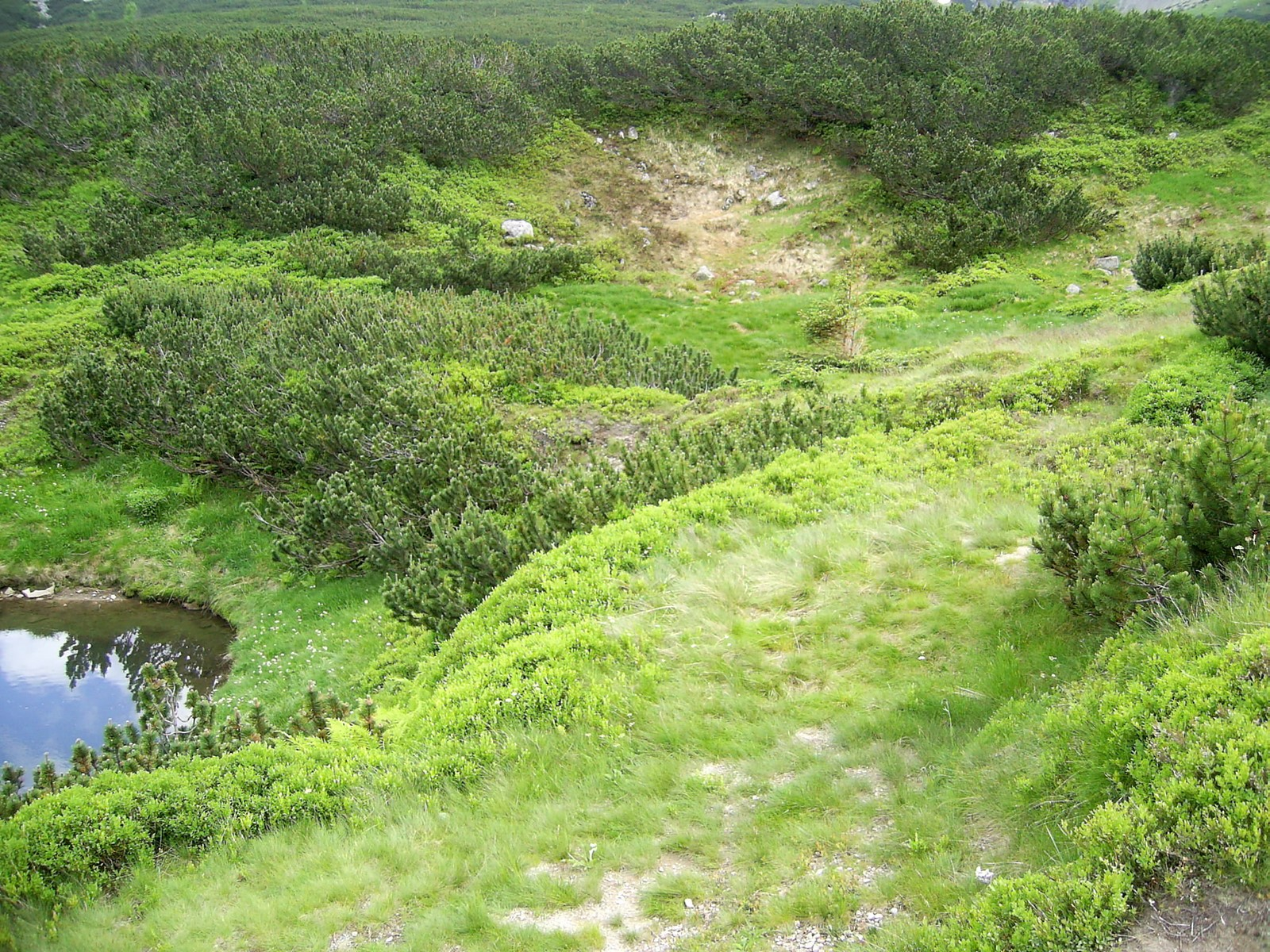 Wyschnięty Dwoiśniak Wyżni ze szlaku na Kasprowy Wierch